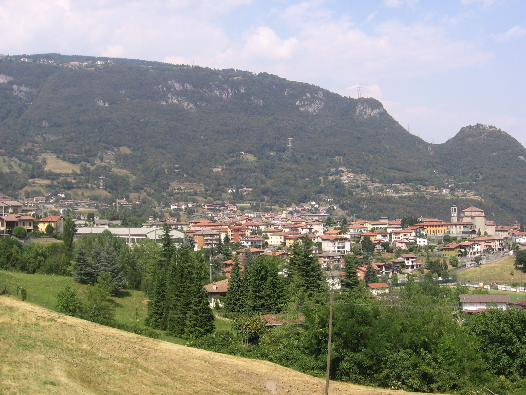 Pianico, Bergamo, Italy